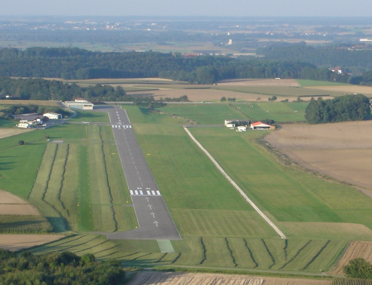 EDMB_Flugplatz_Biberach_a.d._Riss